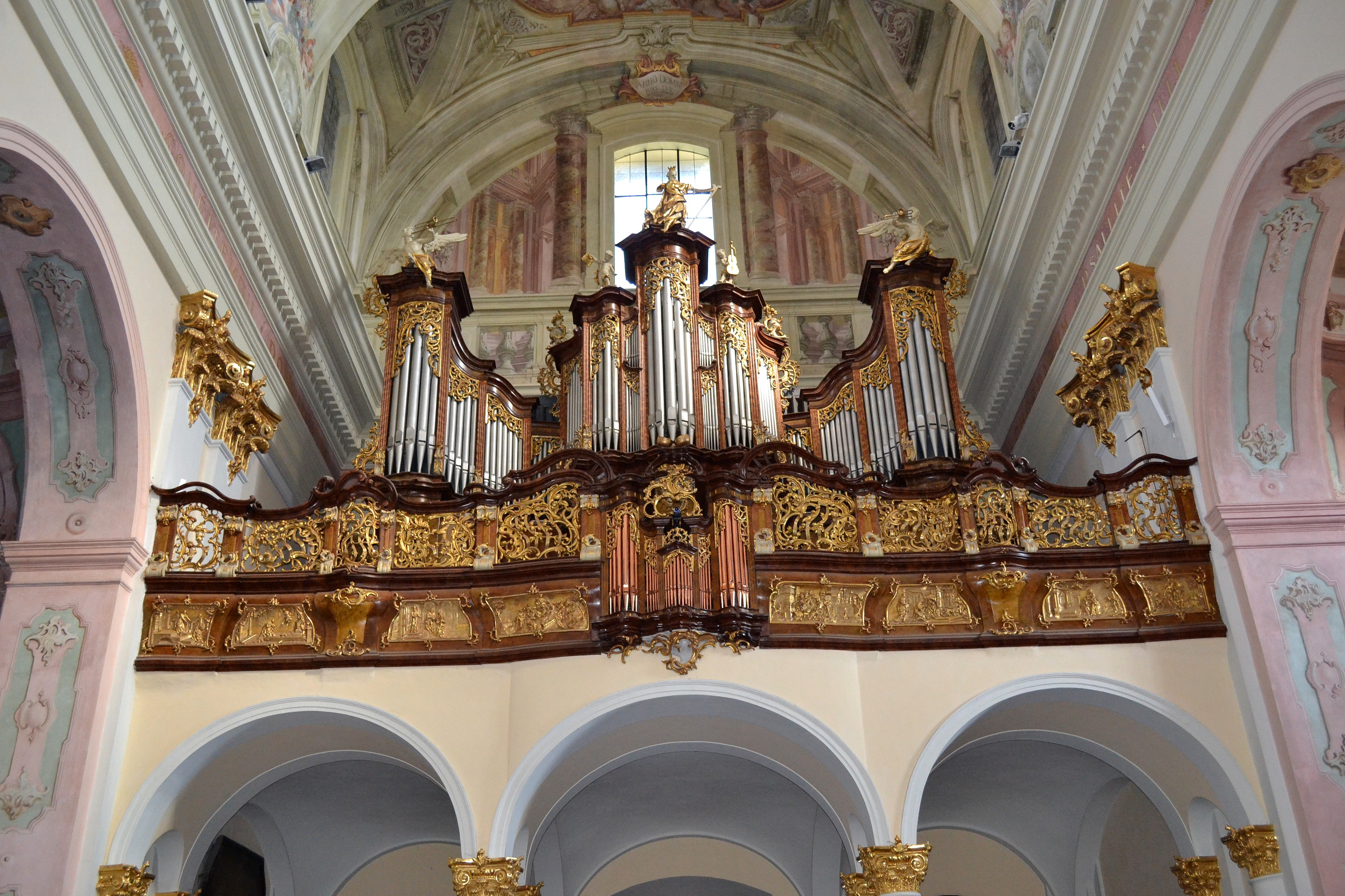 Šaštín-Stráže (okr. Senica), Bazilika Sedembolestnej Panny Márie; chór s organom z roku 1950